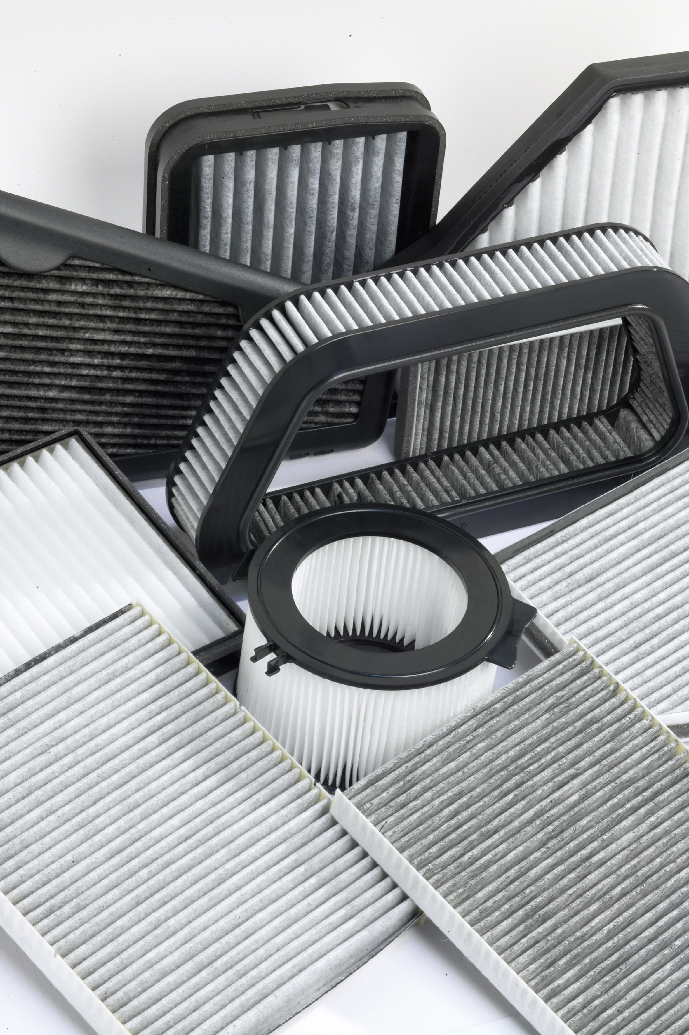 Kabinenluftfilter Produktfamilie